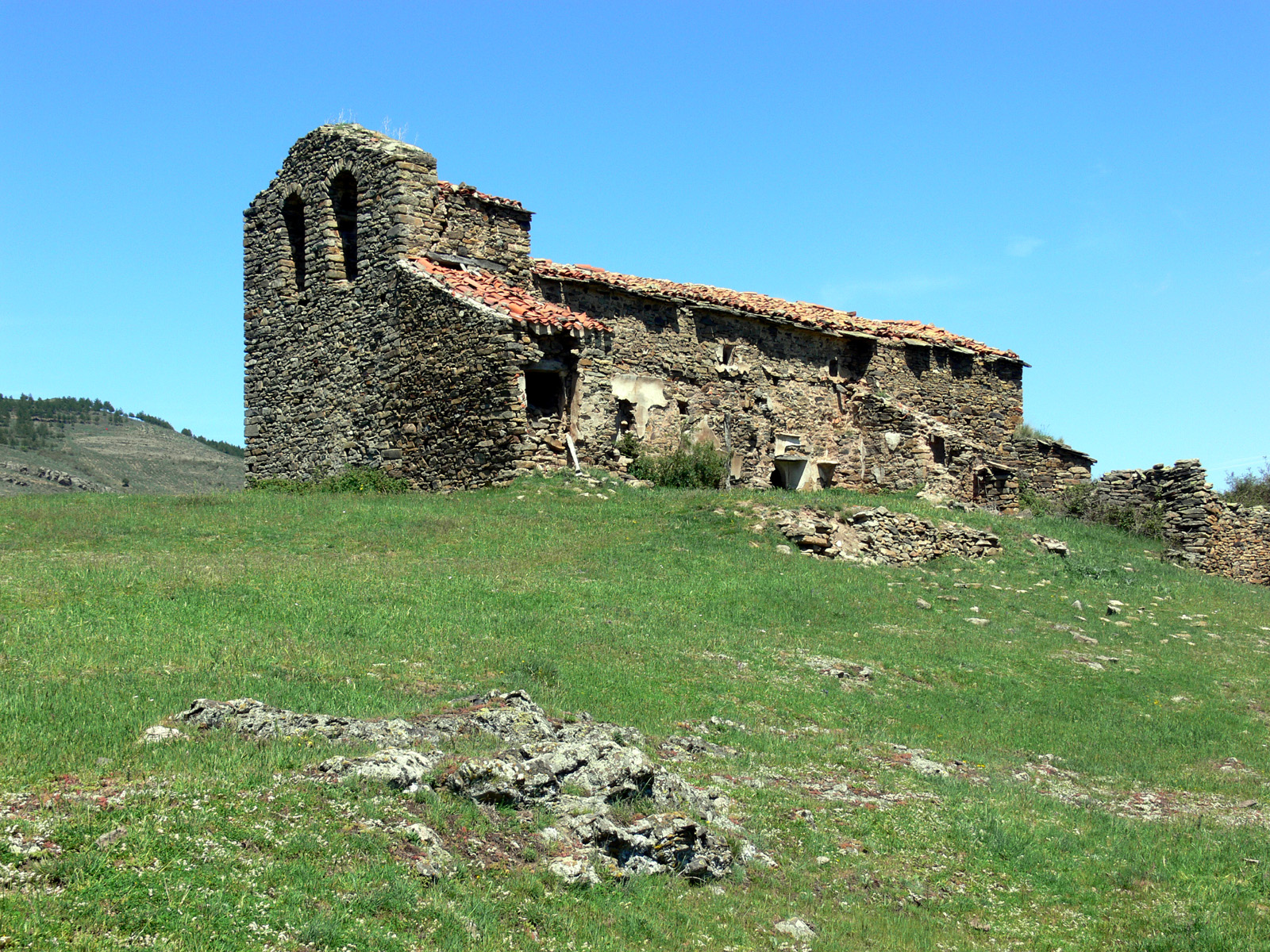 Ruinas de la iglesia de Santiago en Ribalmaguillo, Munilla, La Rioja - España.